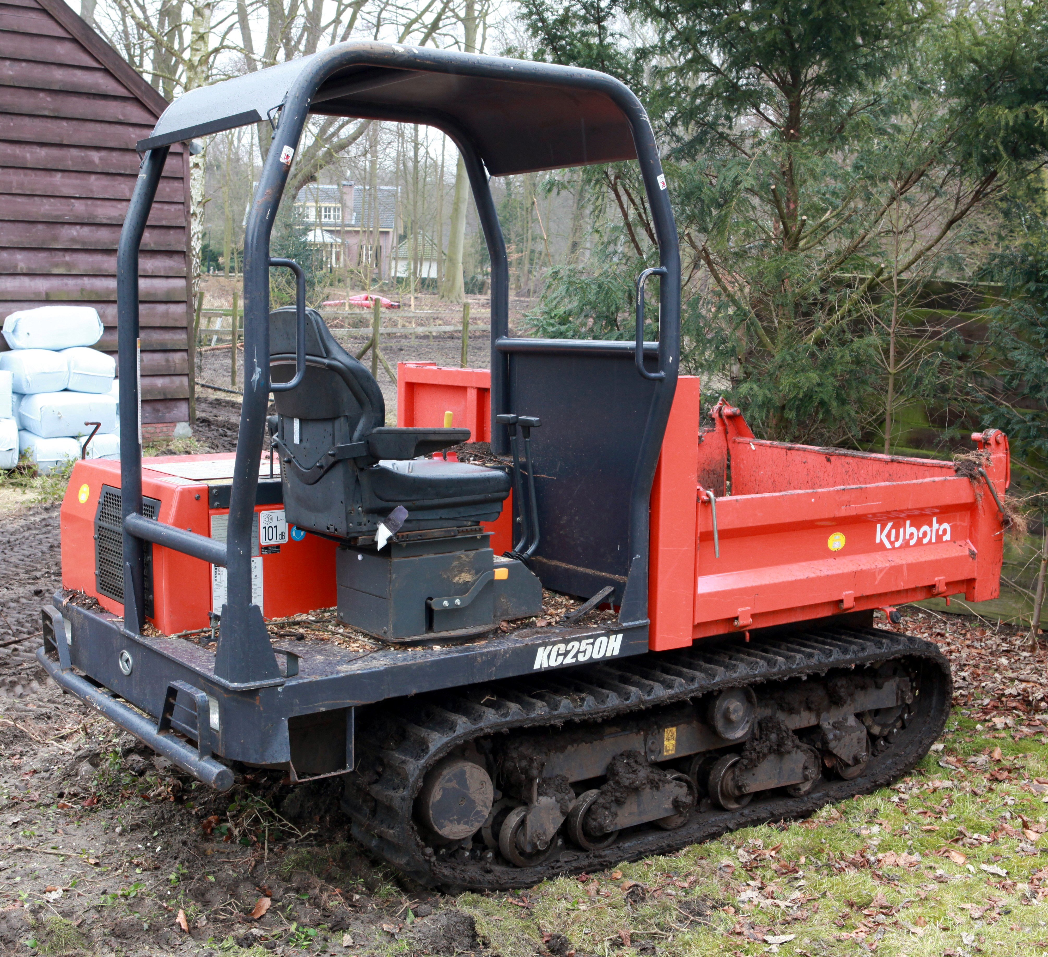 Kubota KC 250 H